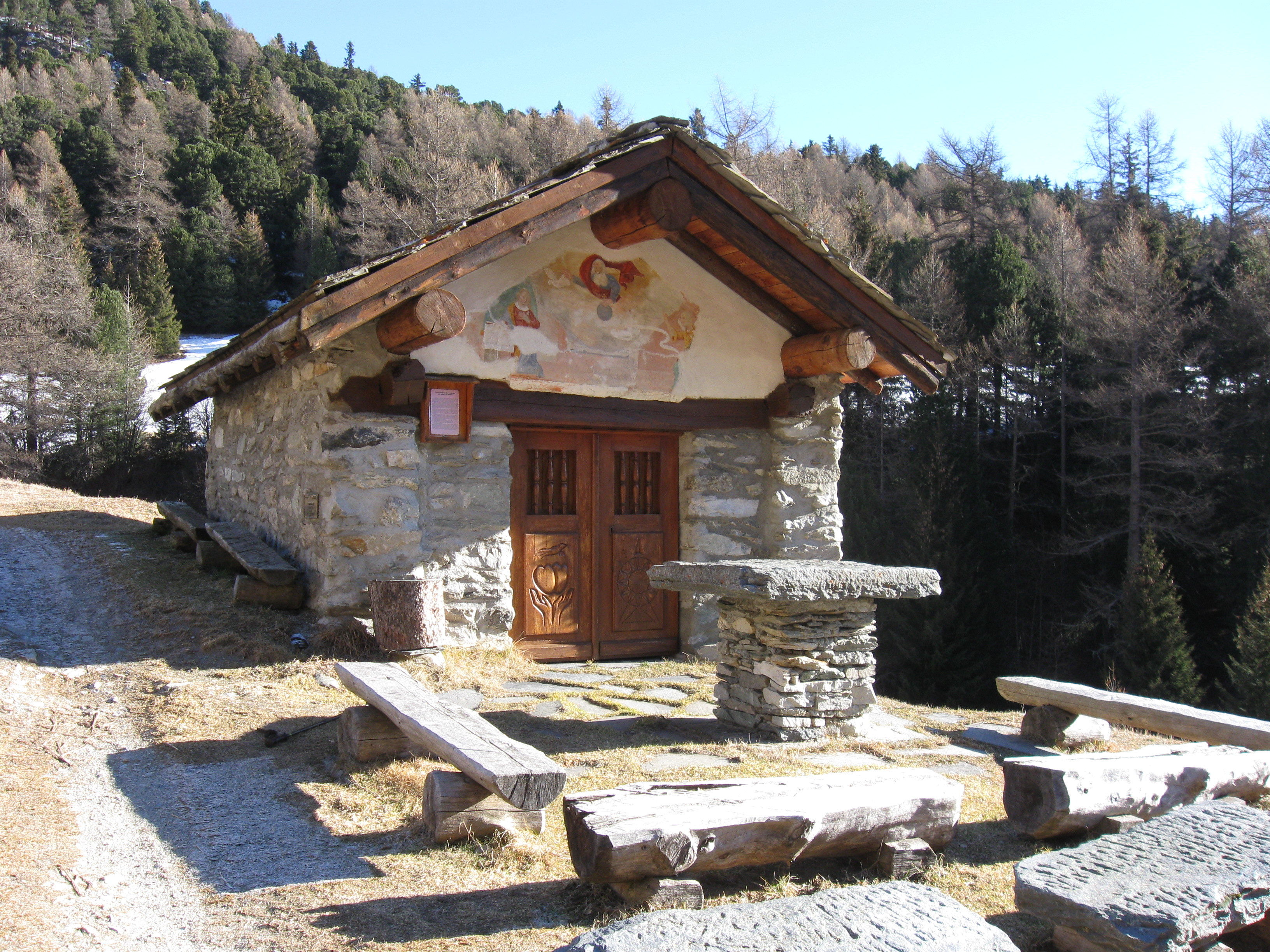 Chapelle Notre-Dame-des-Neiges d'Orgère. (Villarodin-Bourget, Savoie)